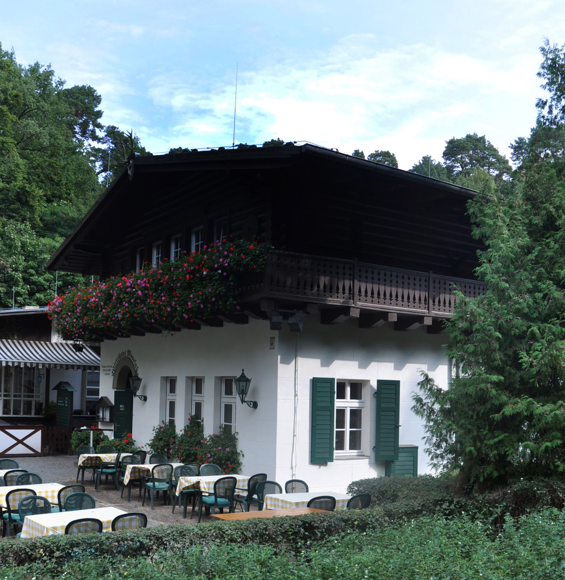 Das Wirtshaus Moorlake